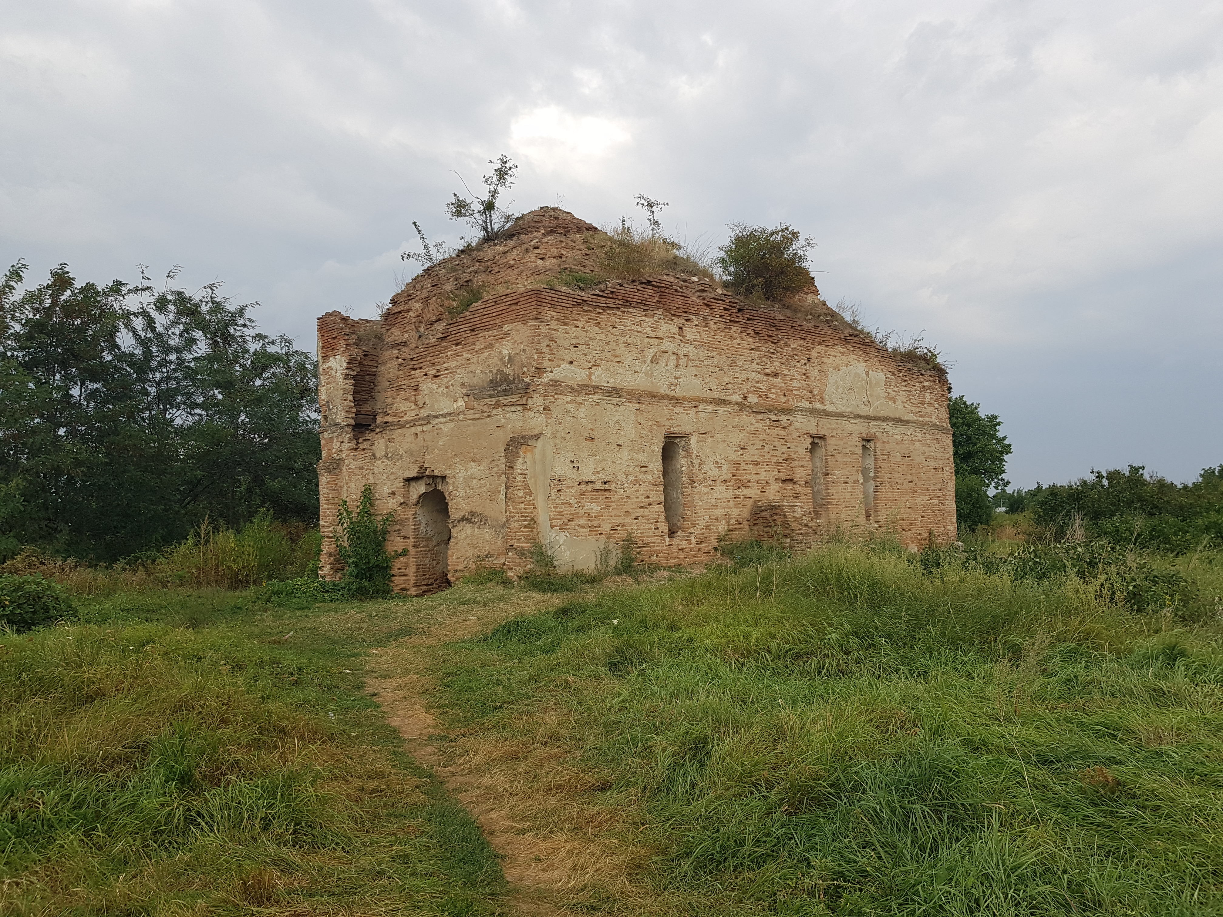 Biserica „Sf. Apostoli Petru și Pavel” - Cazaclii